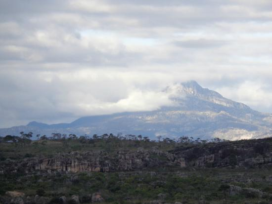 Lindo!